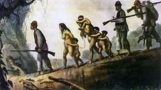 Família Guarani aprionada por escravistas, tela de Jean Baptist Debret, 1930.